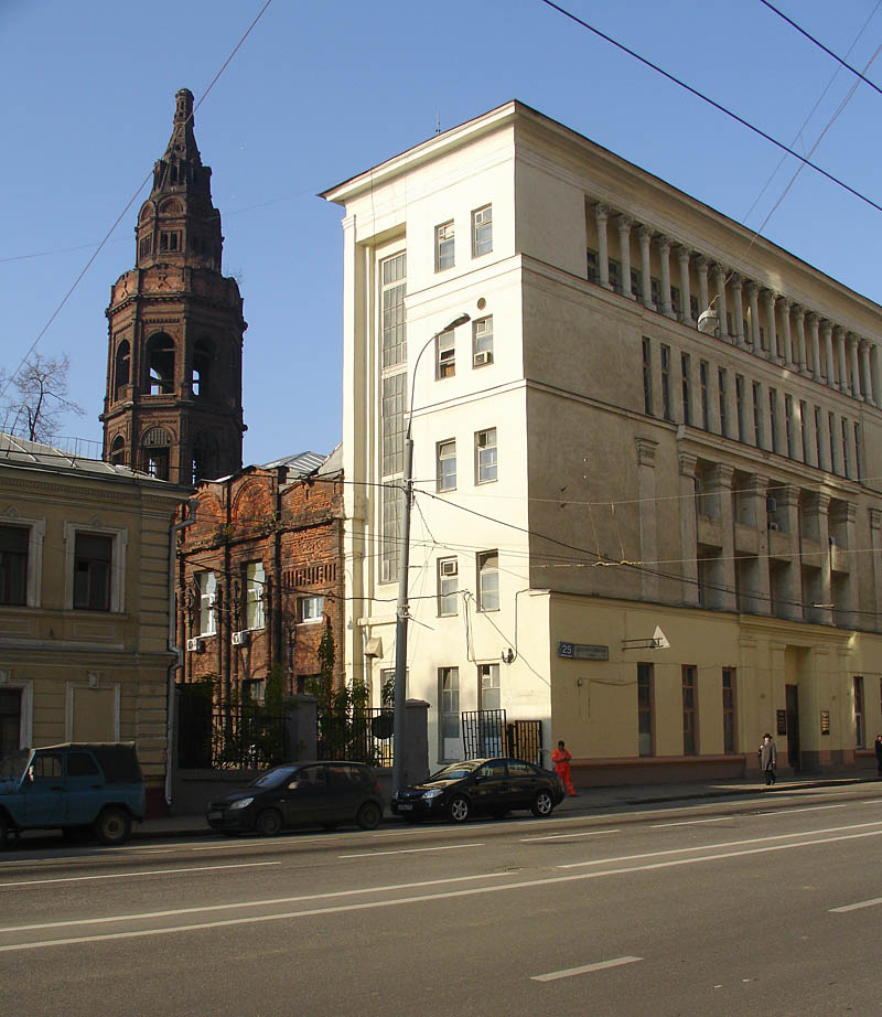 Долгоруковская улица Dolgorukovskaya Street, Moscow